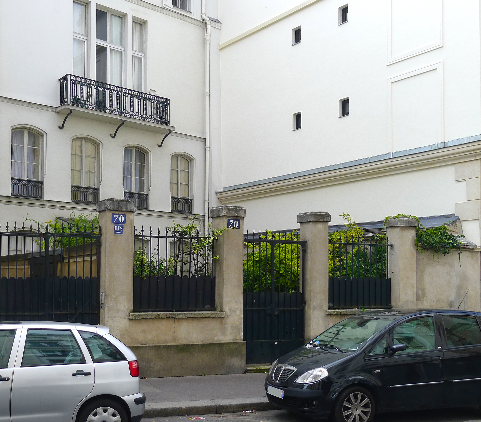 Rue Notre-Dame-des-Champs (n°70 et 70bis) - Paris VI